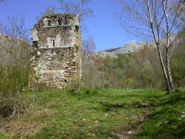 Foto de las Ruinas del Monasterio de San Román de Entrepeñas